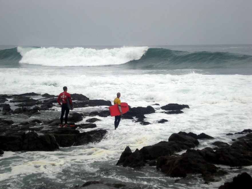 mike stewart campeon del ACC'09 de peto amarillo en los octavos de final.